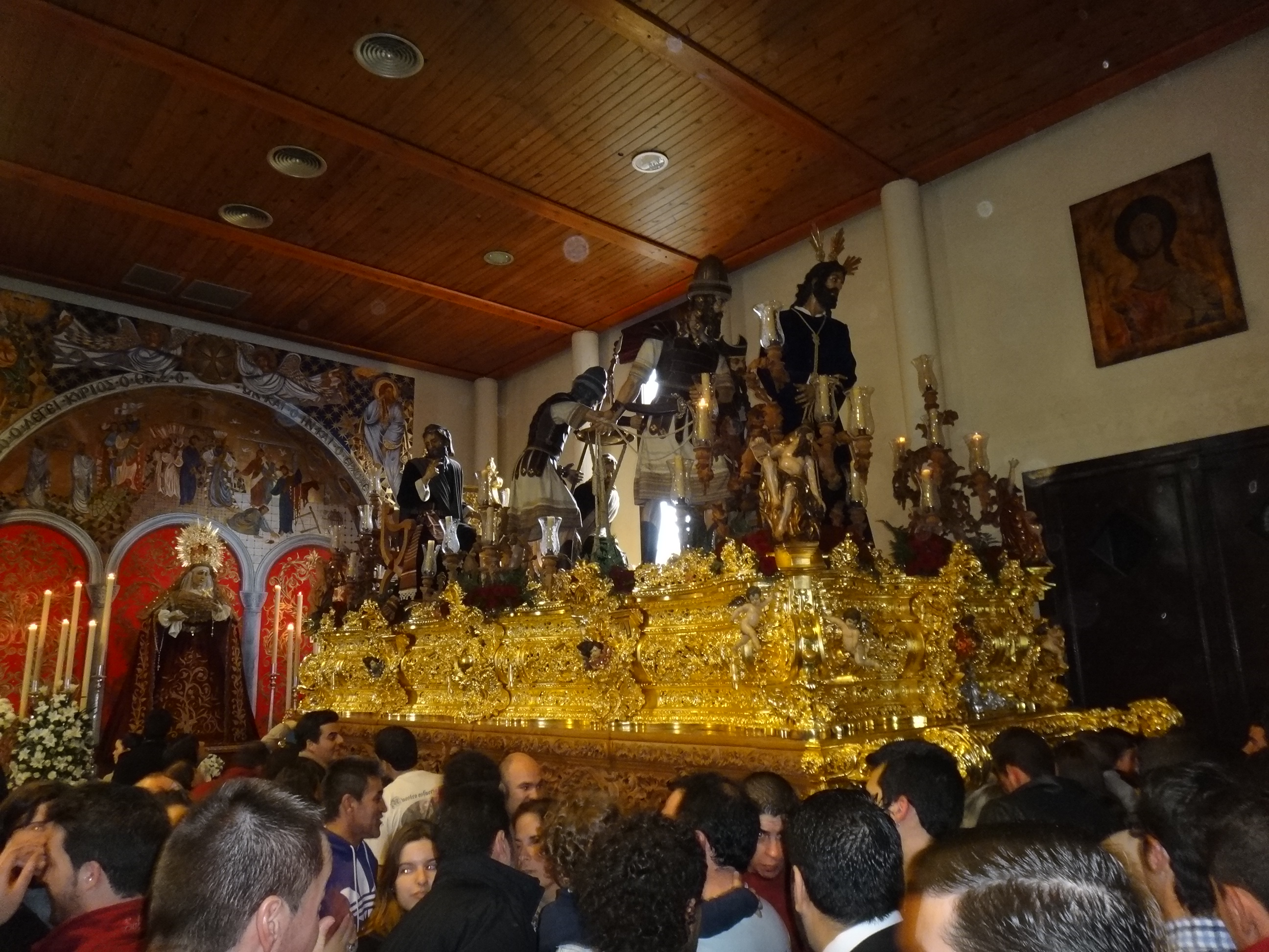 Soberano Poder. Jerez de la Frontera (Andalucía, España). Parroquia Santa María Madre de la Iglesia